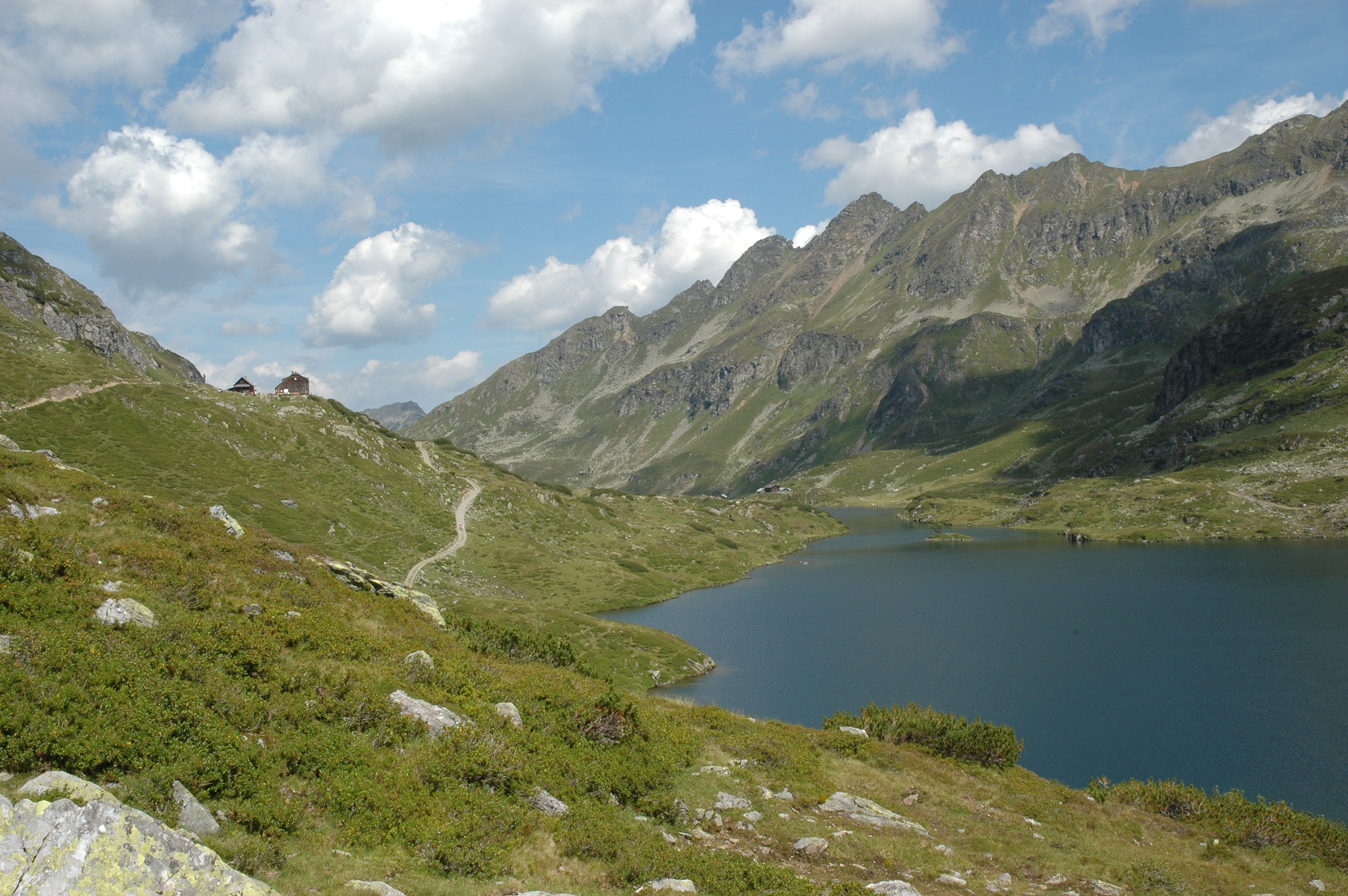 Niedere Tauern, Unterer Giglachsee und Ignaz Mattis Hütte (1986 m)